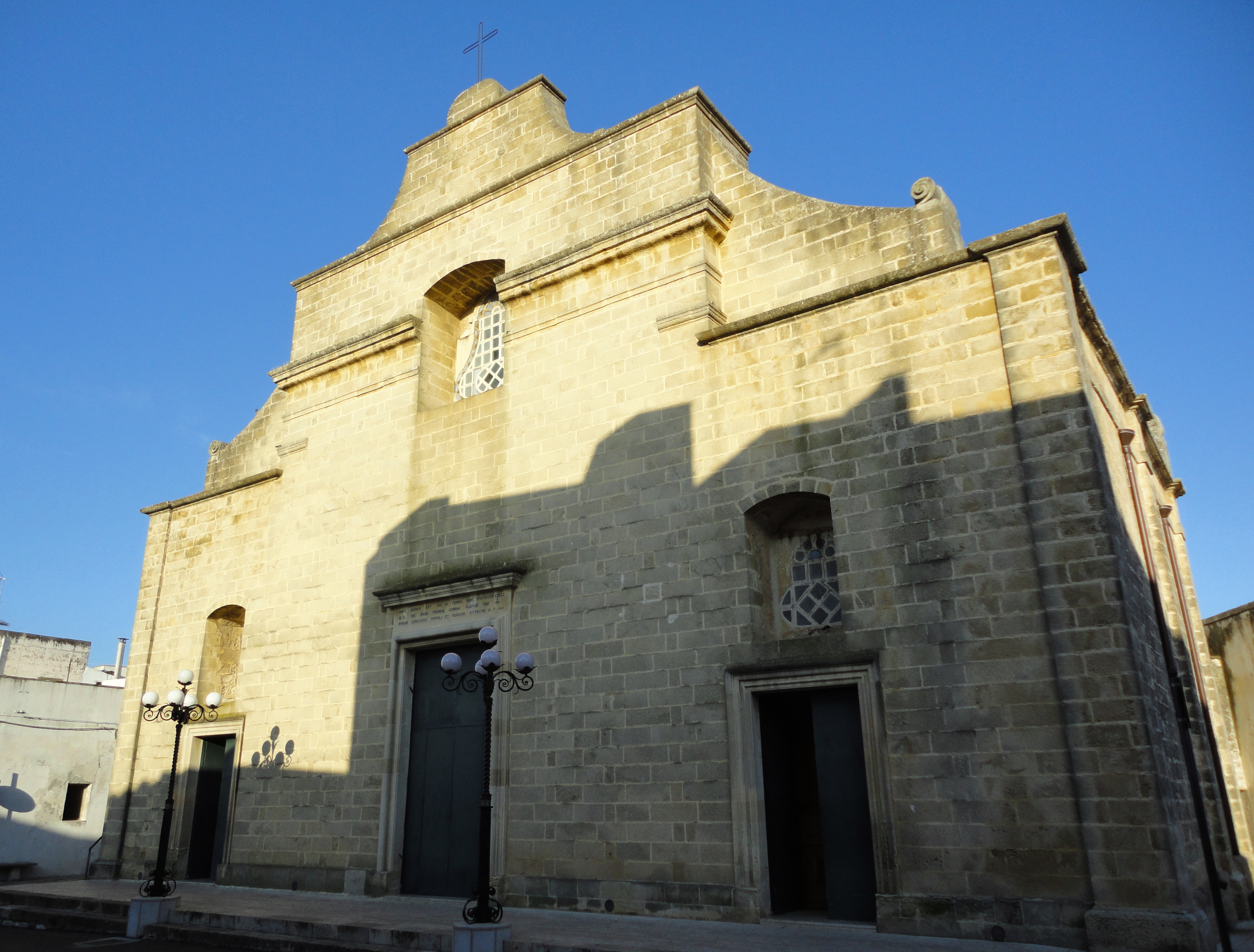 Chiesa dello Spirito Santo Botrugno, Lecce